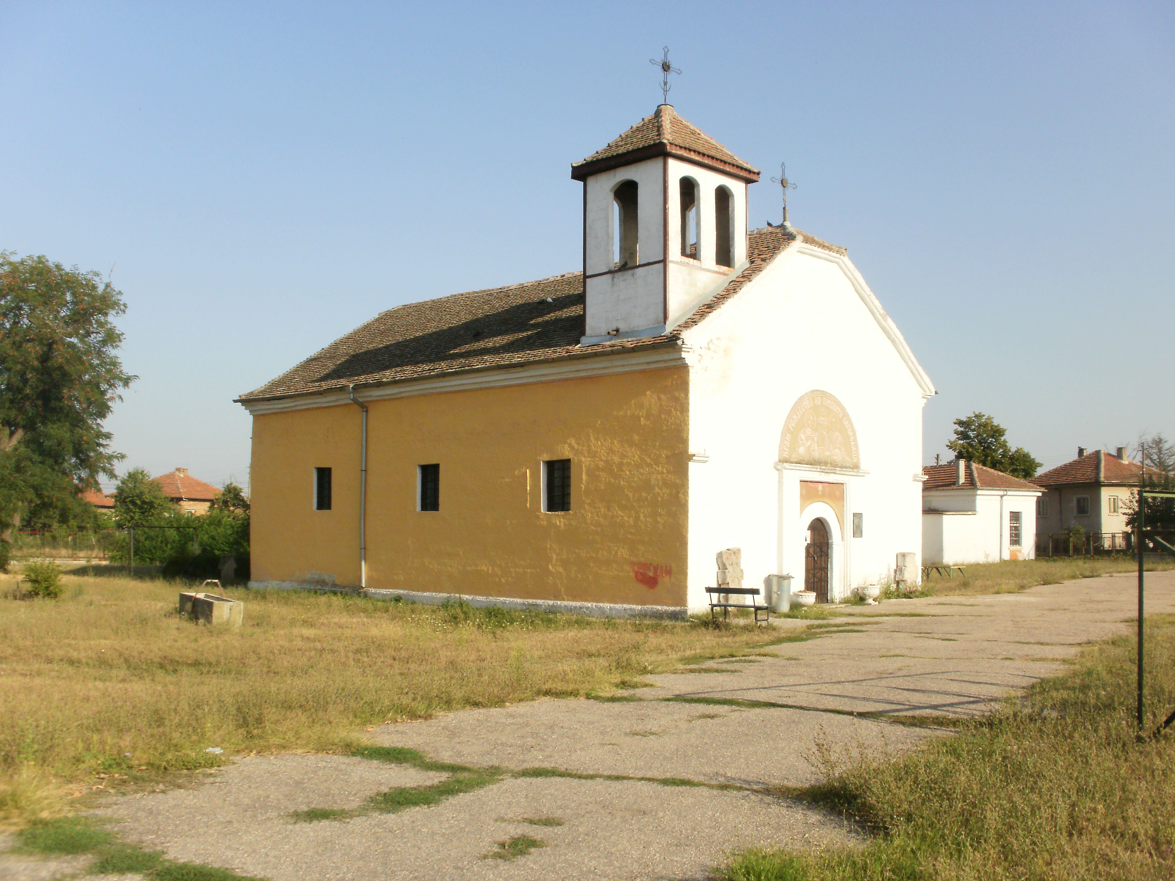 Рождество на Пресвета Богородица в Дунавци